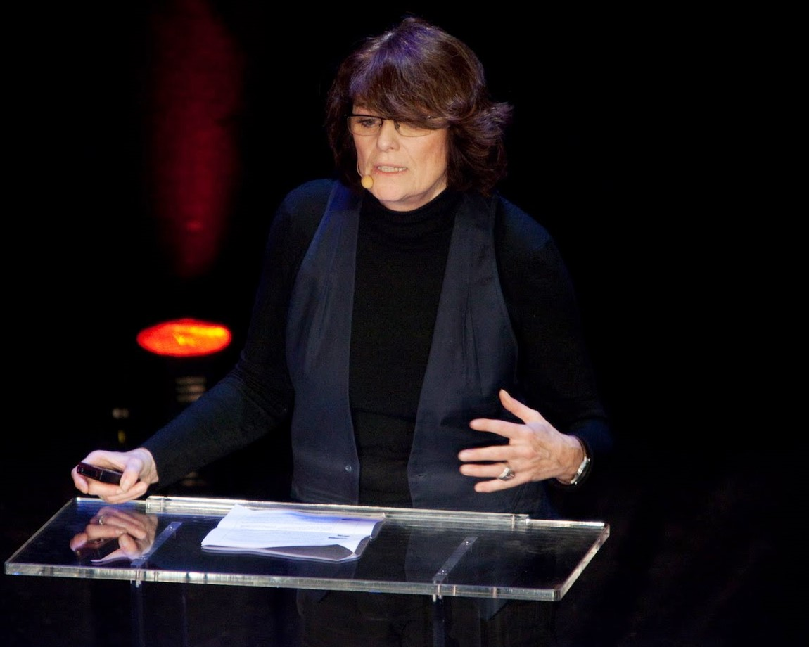 Françoise Schein lors de la conférence TEDx Paris 2010